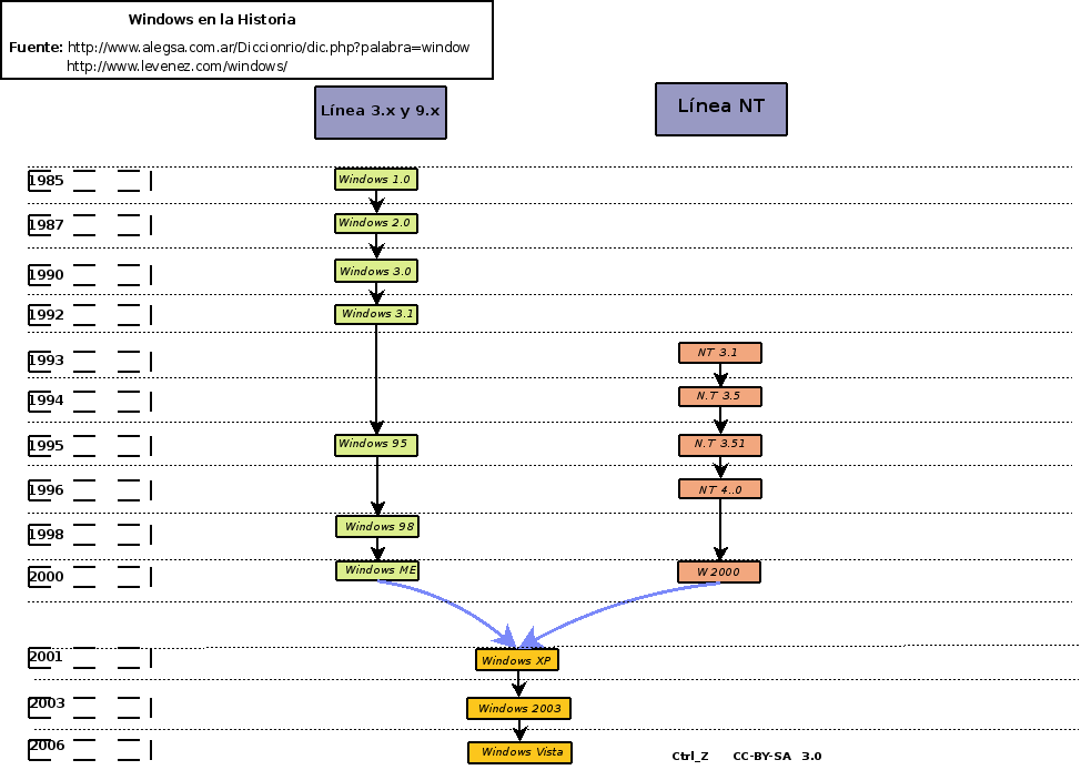 Diferentes versiones de Windows en la historia (INCOMPLETO)